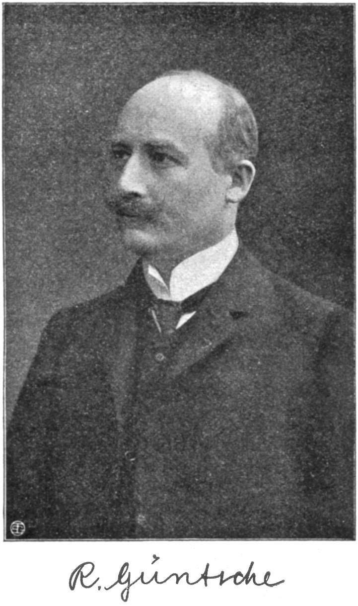 Fotographie und Unterschrift von Richard Güntsche (1861–1913)